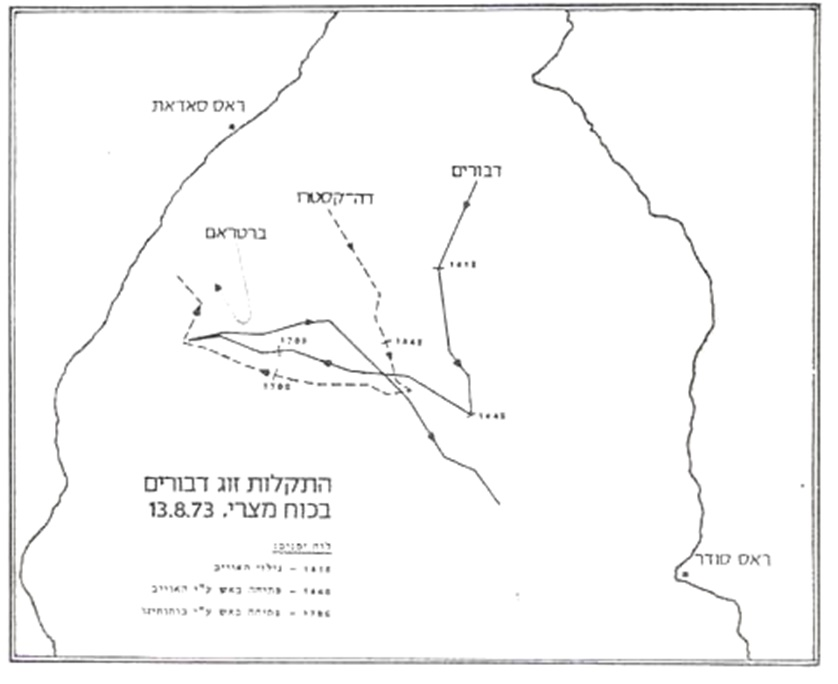 תרשים קרב הדבורים עם ספינת 'דה קסטרו' ב-13 באוגוסט 1973 ושימש טבילת אש לצוותי הדבורים.